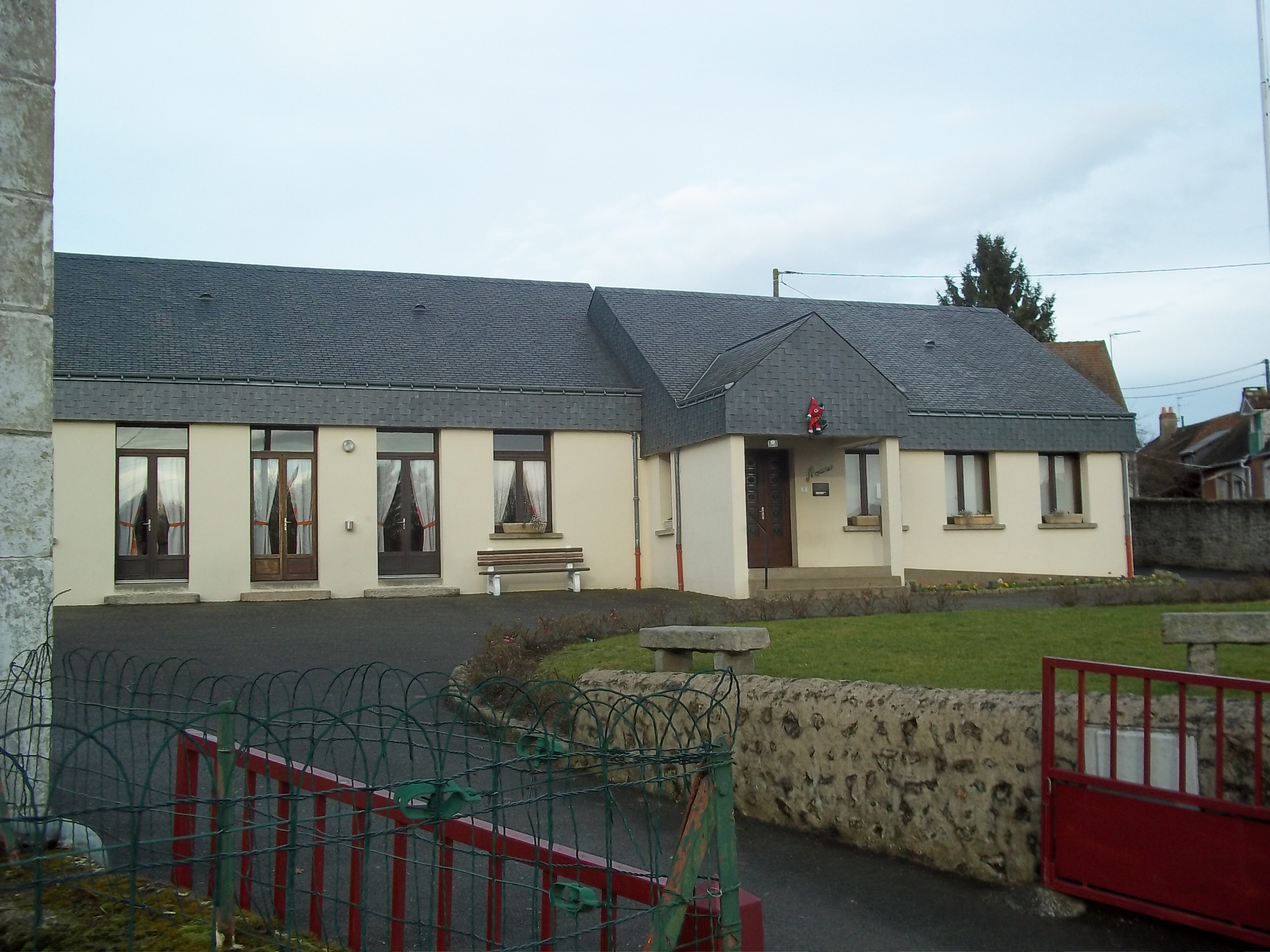 Juillé (Sarthe) ancienne mairie (jusqu'en 2018)